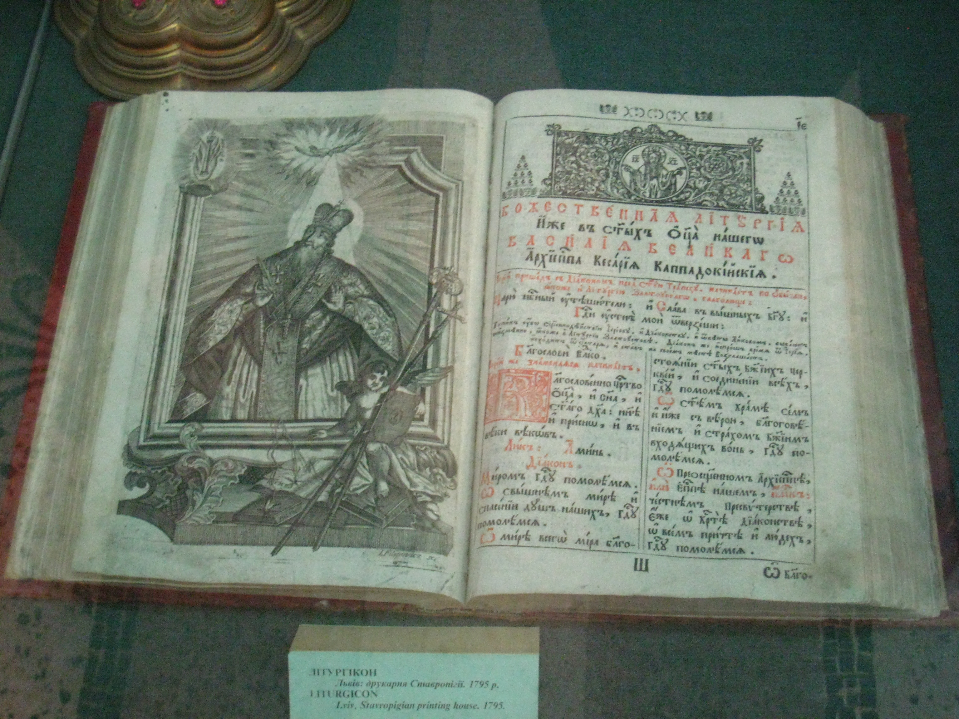 Il Liturgicon è aperto sulla prima pagina della Divina Liturgia di San Basilio Magno